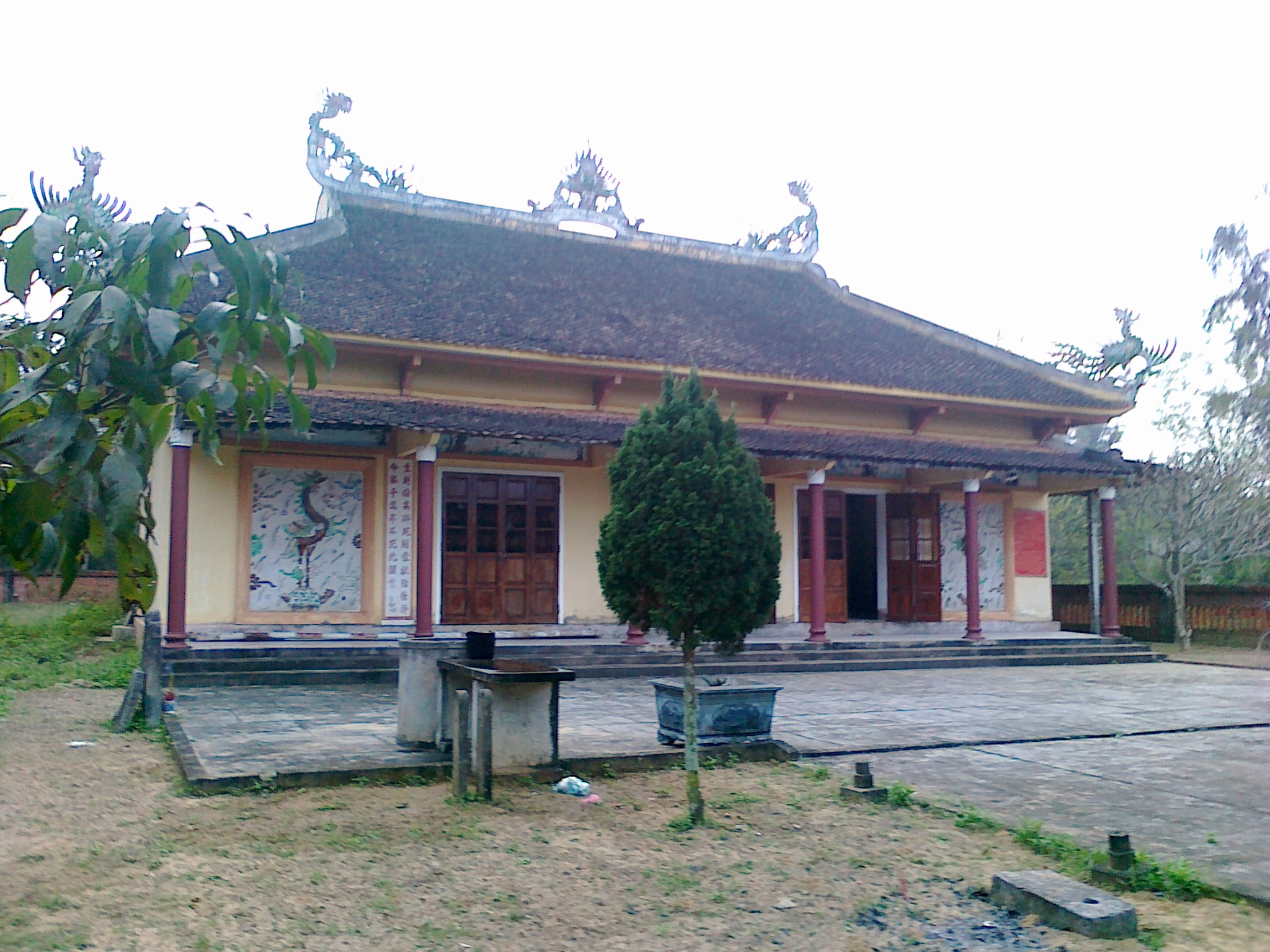 Ảnh chụp toàn cảnh Điện Đông Hải